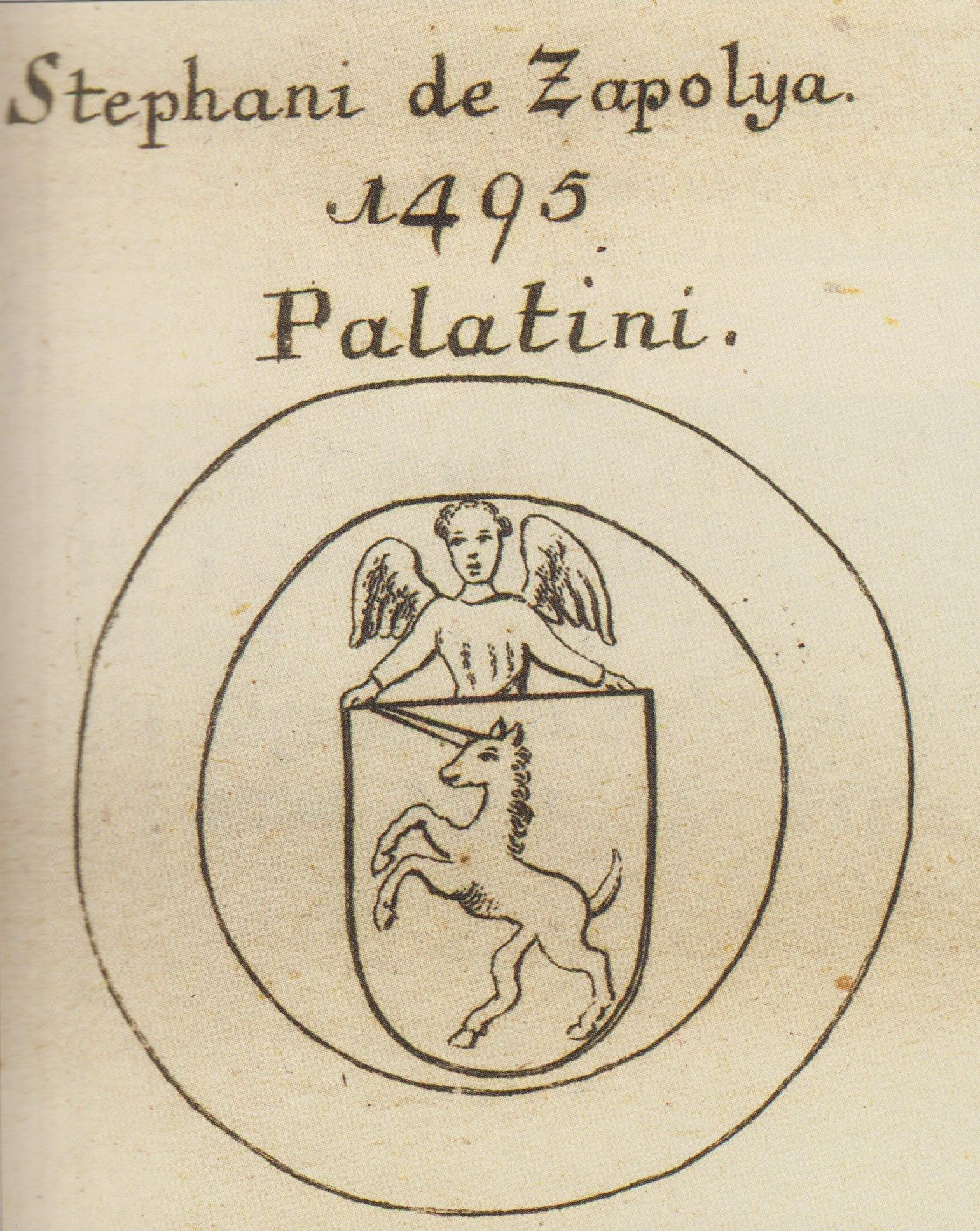 Erb Štefana Zápoľského. Štefan Zápoľský (* 1434 – † 23. december 1499, Pápa) bol krajinský hodnostár, palatín (od r. 1492), vojvodca a silný spojenec kráľa Mateja Korvína, mladší brat Imricha Zápoľského.